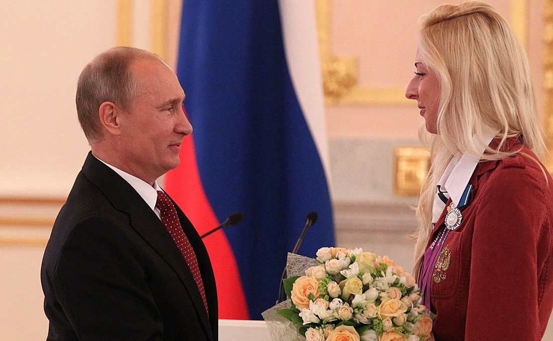 Олеся Владыкина